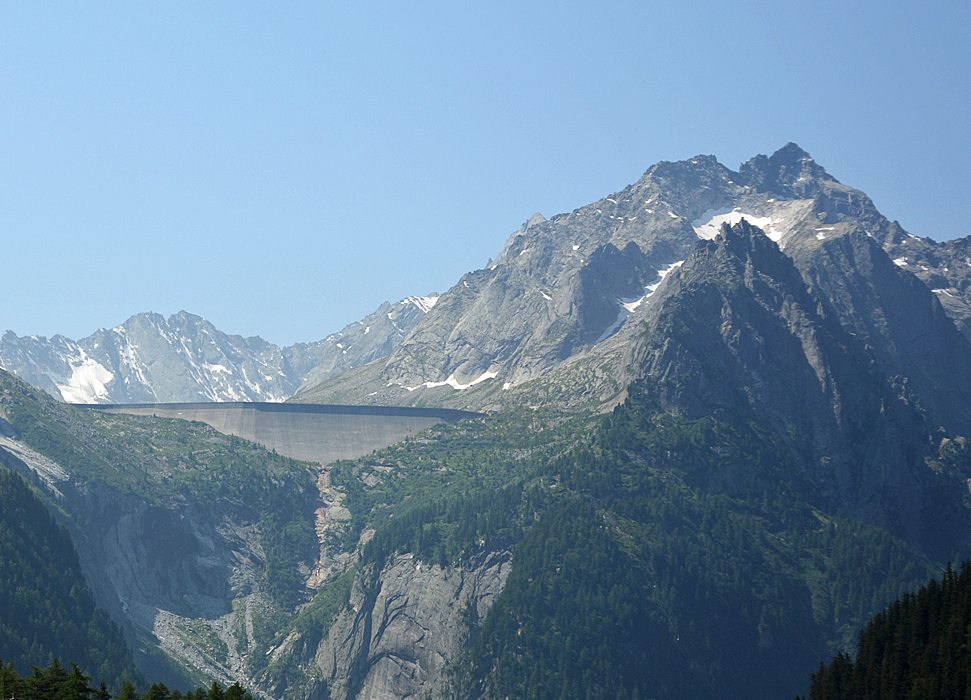 Piz Cacciabella GR mit Staumauer des Albignasee